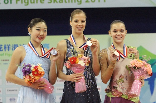 Подиум в женском одиночном катании на Кубке Китая 2011. Слева на право: Мирай Нагасу (2-е место), Каролина Костнер (1-е место), Аелина Сотникова (3-е место)